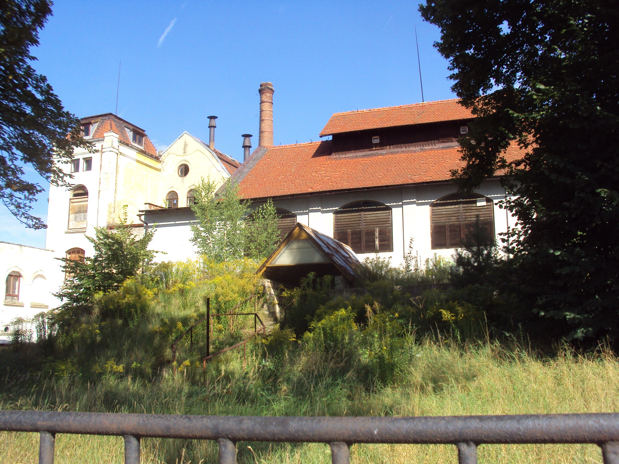 Zaniklý pivovar v Cvikově, ulice Pivovarská